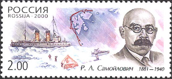 Почтовая марка России 2000 года из серии «Полярные исследователи», посвященная Р.Л.Самойловичу. На марке — портрет Самойловича, спасение экспедиции на дирижабле «Италия»: ледокол «Красин», пострадавшие участники экспедиции, самолёт Б.Г.Чухновского, карта Шпицбергена с маршрутом операции по спасению. №556 по каталогу ИТЦ «Марка». Художник — А.Керносов. Тираж — 300 тыс. экз.